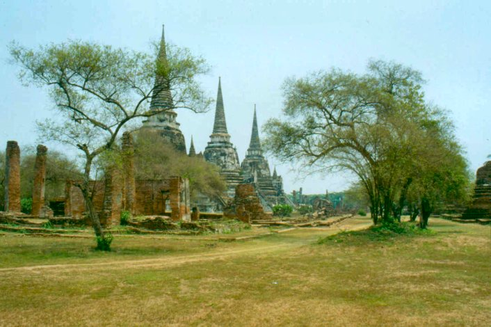 Anlage von Ayutthaya